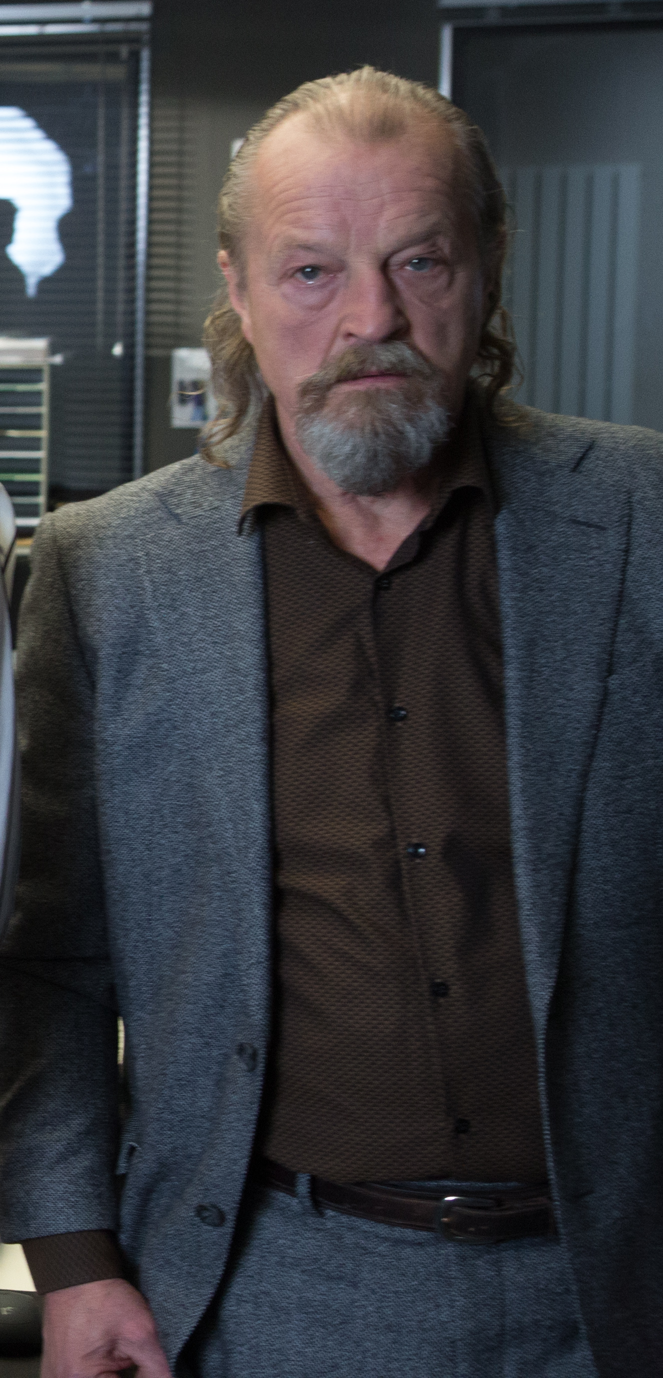 Pressetermin am Set der ZDF-Krimiserie "Professor T." mit den Hauptdarstellern Matthias Matschke, Andreas Helgi Schmid, Paul Faßnacht, Julia Bremermann und Axel Schneider